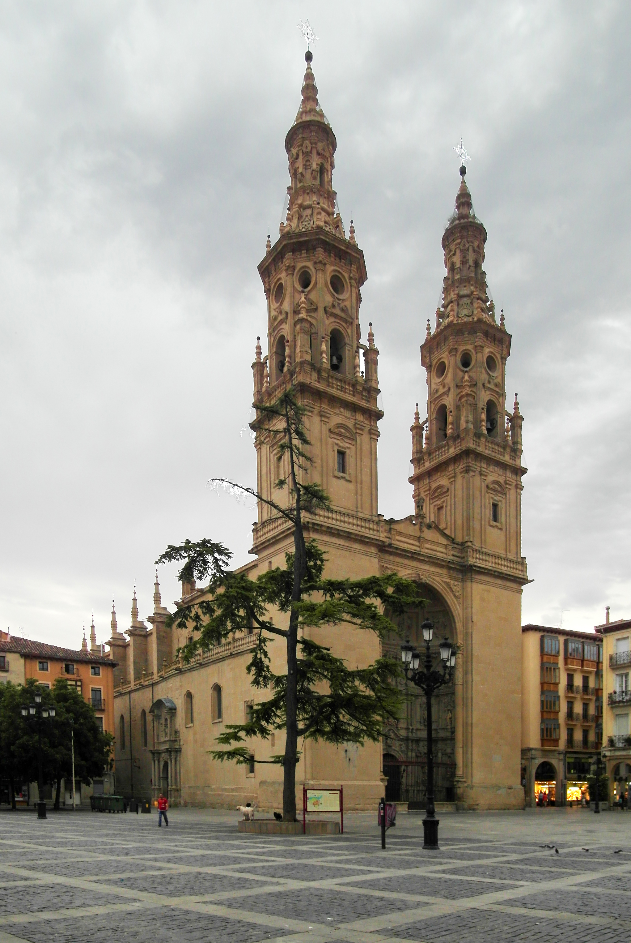 Logroño, La Rioja.